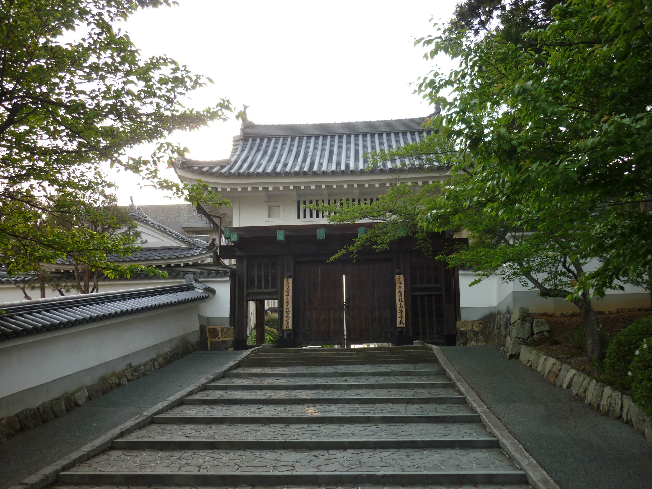 城門